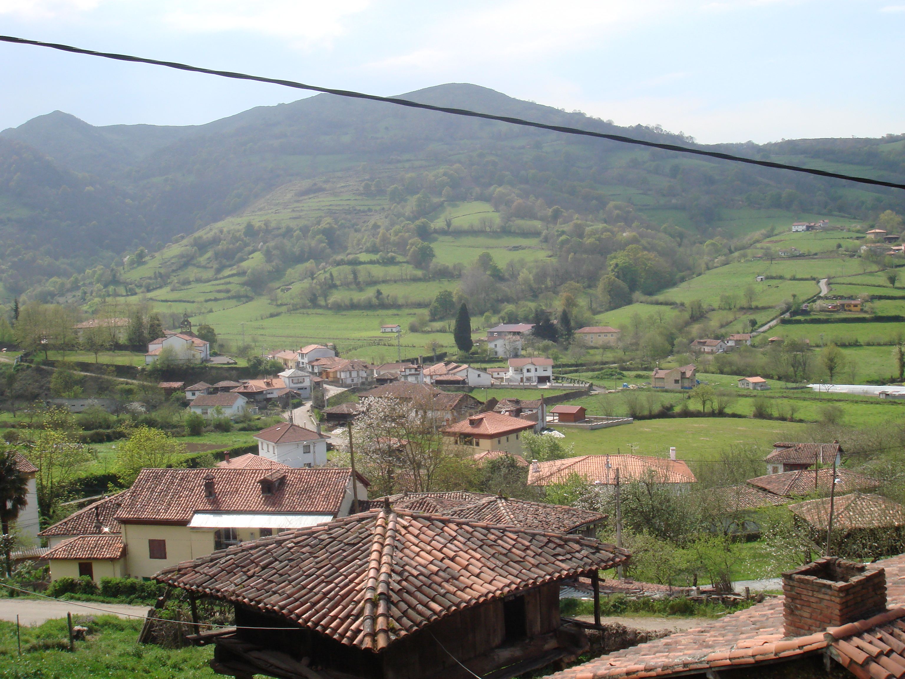 horreo de sama